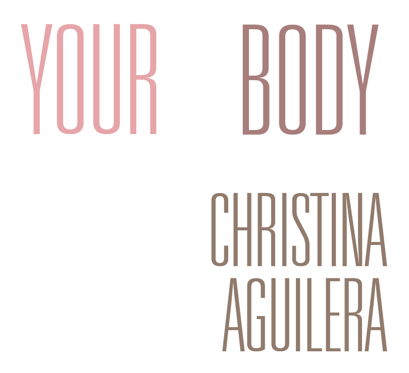 Logotipo del sencillo de Christina Aguilera "Your Body".